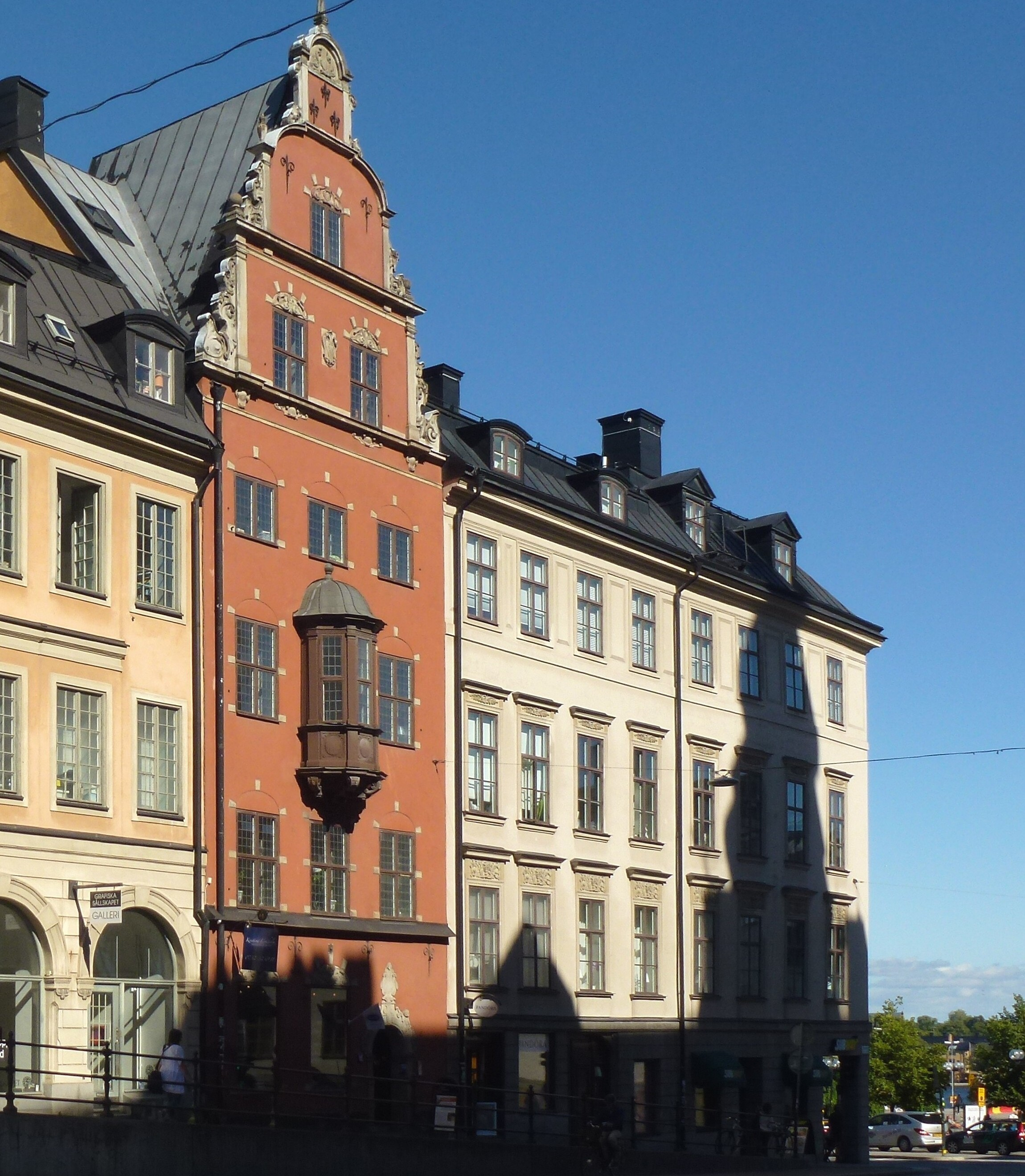 Hans Marschalcks hus sett från Honsgatan